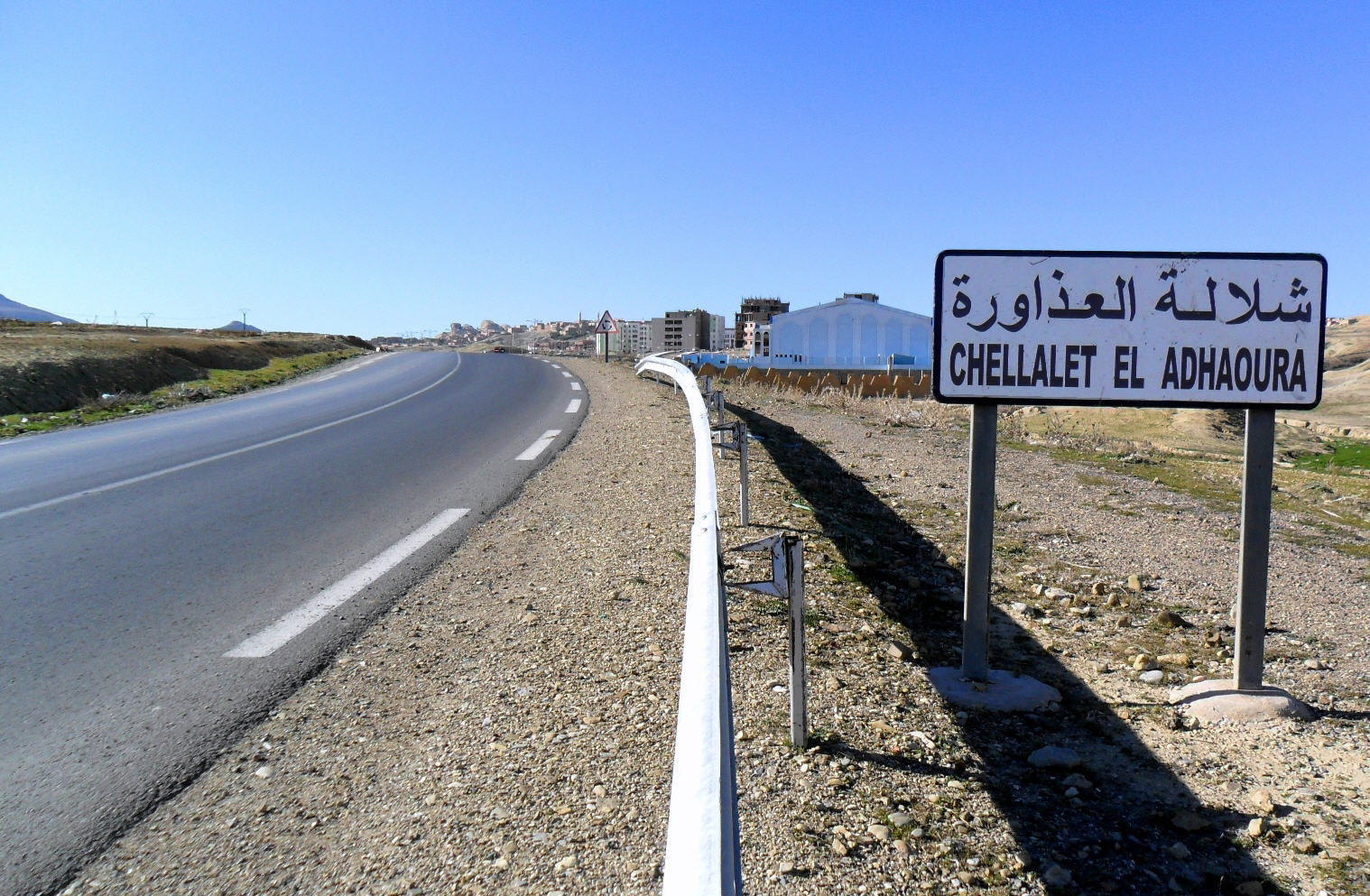 بلدية شلالة العذاورة بالمدية